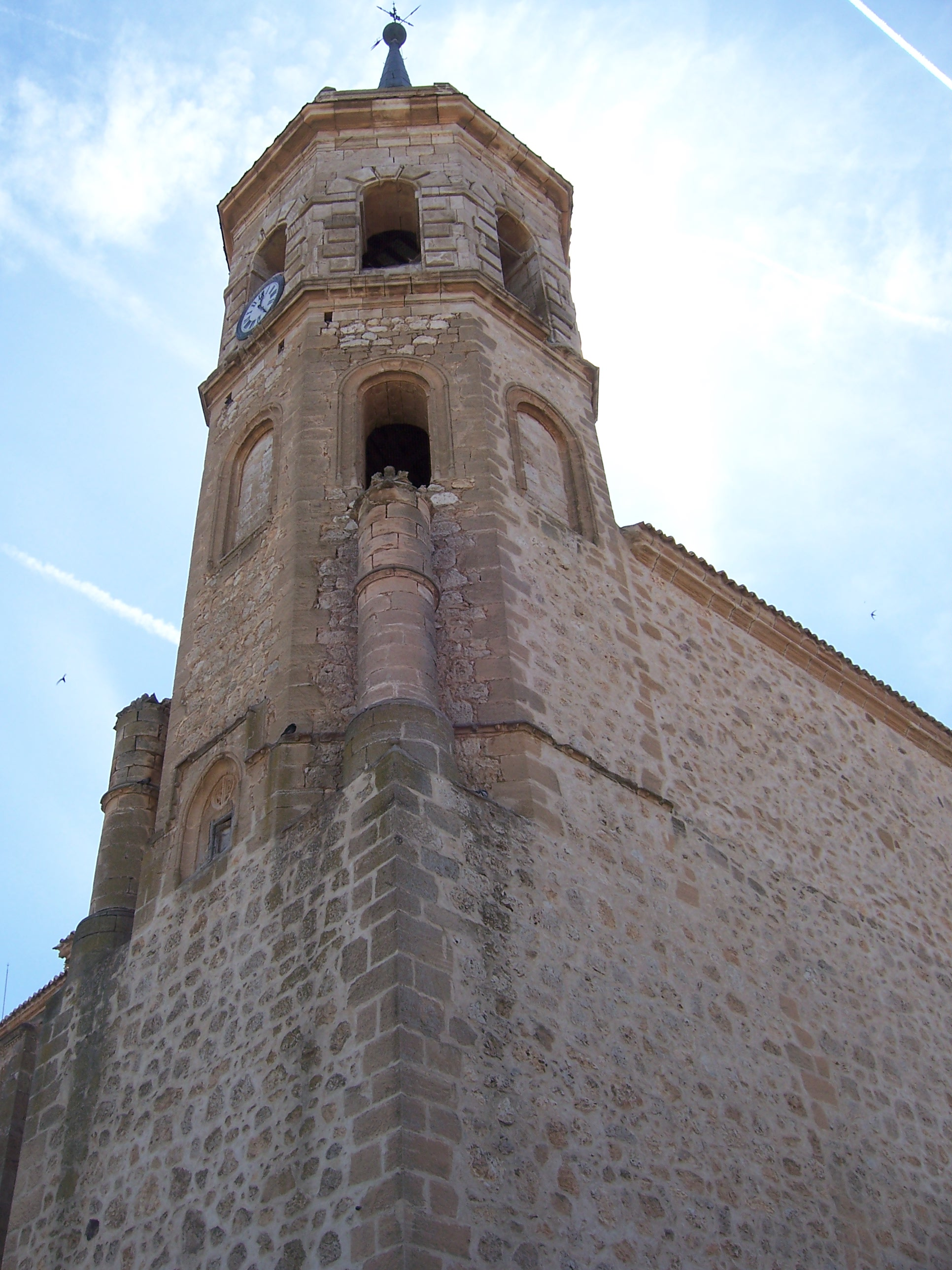 Iglesia Parroquial Tembleque